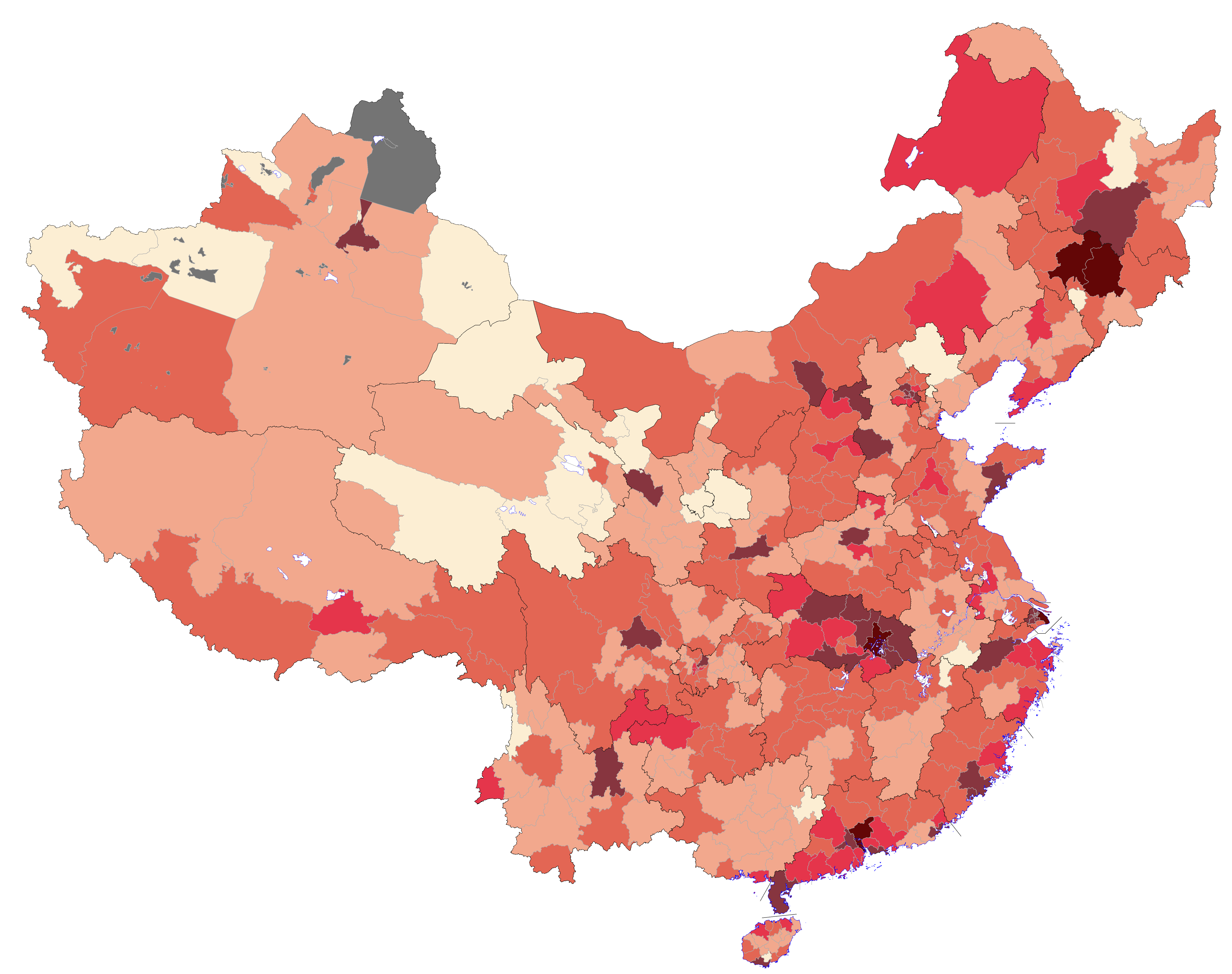 中國大陸2019新型冠狀病毒感染地圖，按感染者數量。